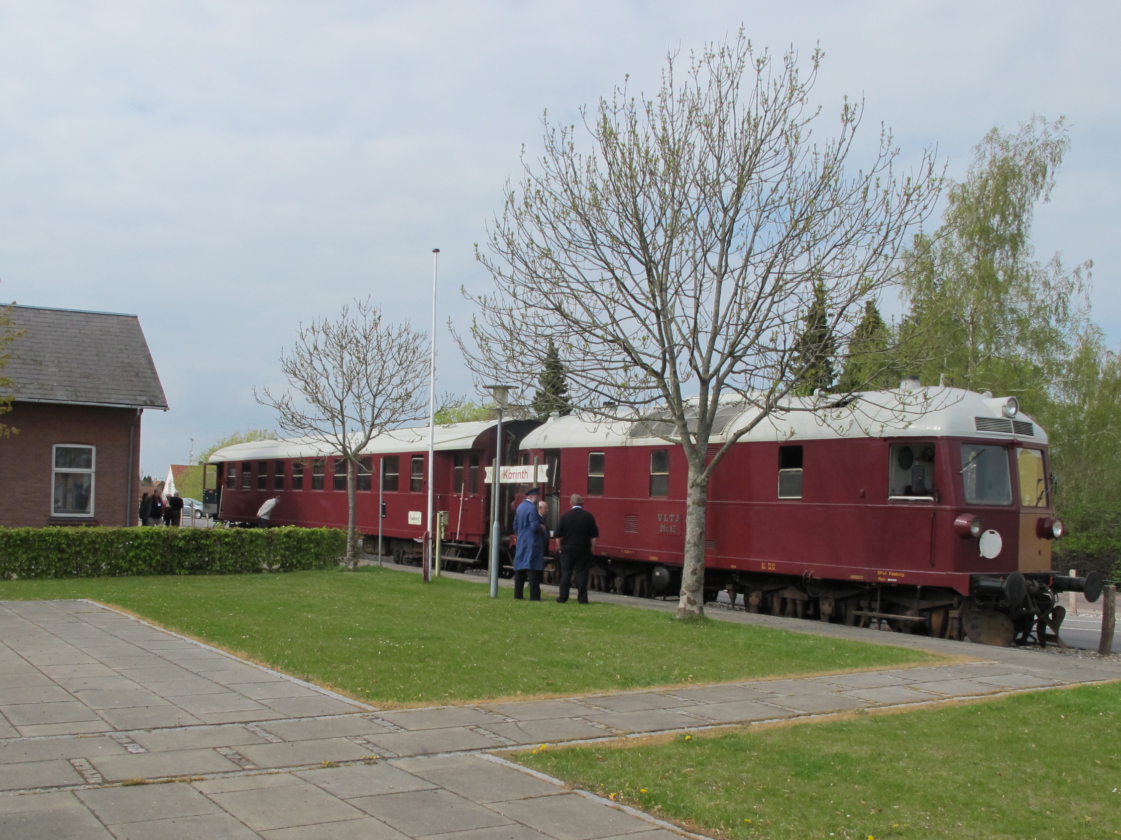 Museumszug der Syd Fyenske Veteranjernbane (SFvJ) mit VLTJ ML12 in Korinth